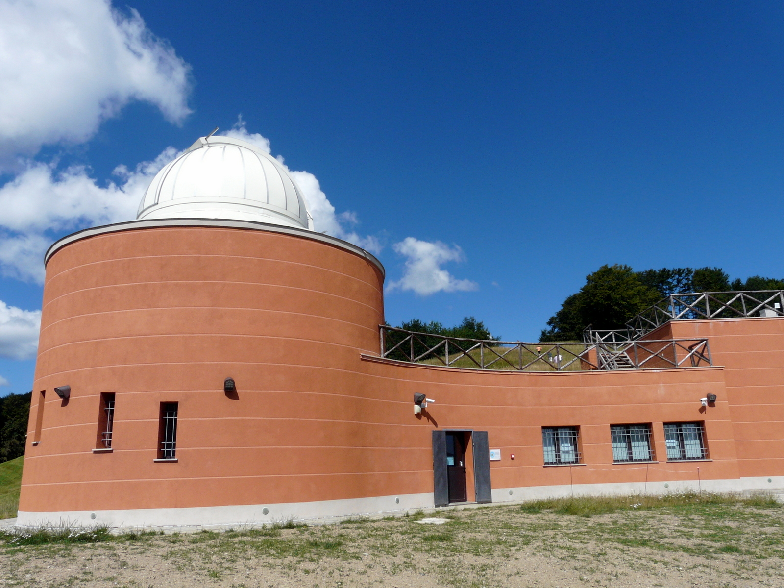 Osservatorio astronomico di Casa del Romano, Fascia, Liguria, Italia